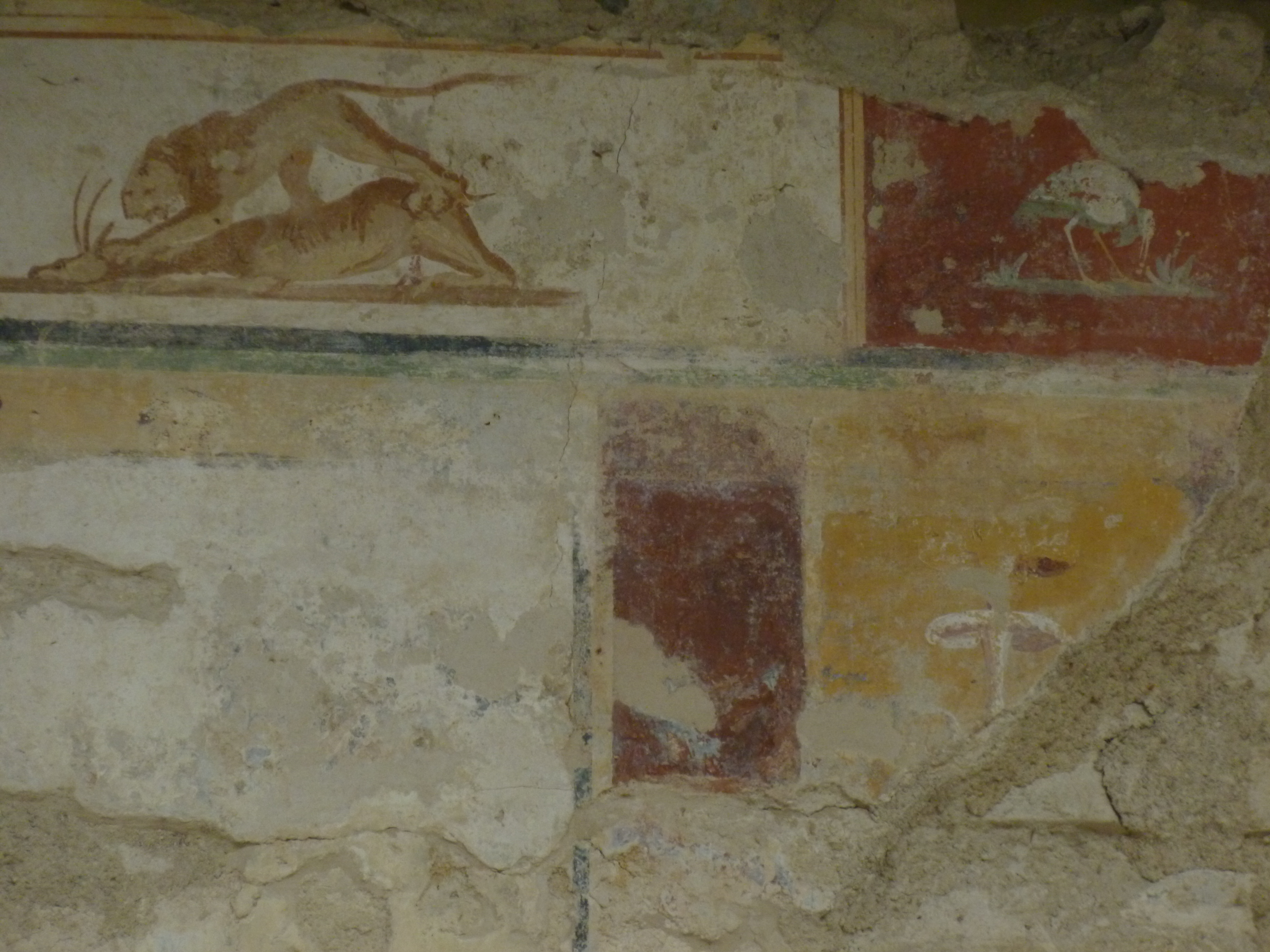 Fascia superiore della decorazione pittorica del braccio meridionale del Criptoportico This is a photo of a monument which is part of cultural heritage of Italy.